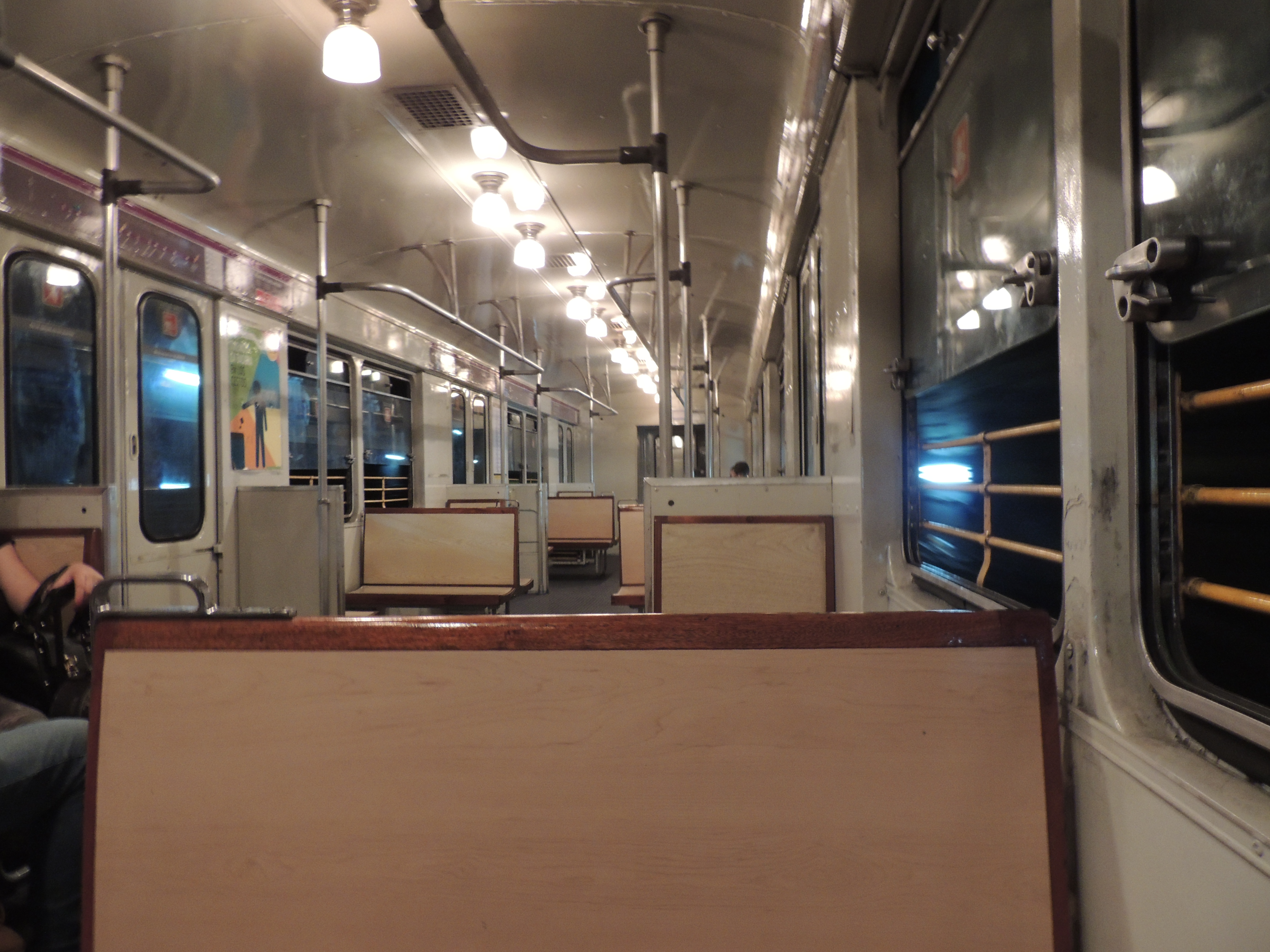 Interior of a CAF/General Eléctrica Española from the Buenos Aires Metro